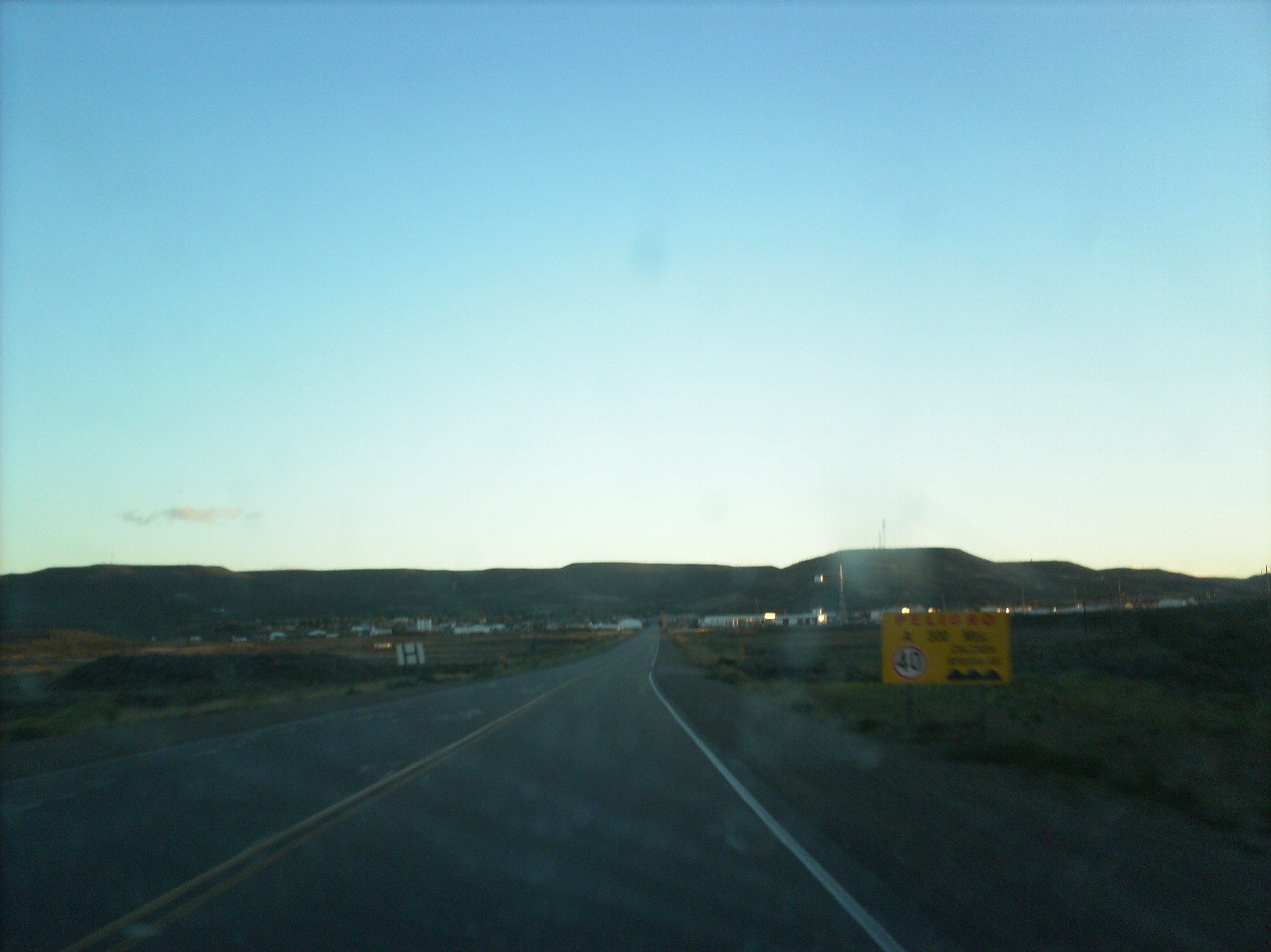 la entrada a la localidad de cañadon